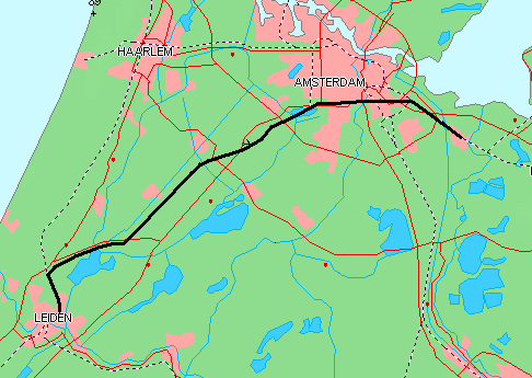 kaart van het tracé van de Schiphollijn